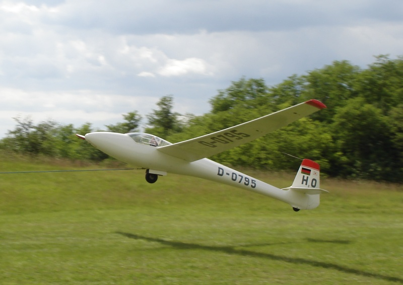 Glasflügel H301 Libelle beim Windenstart, Eigenes Bild